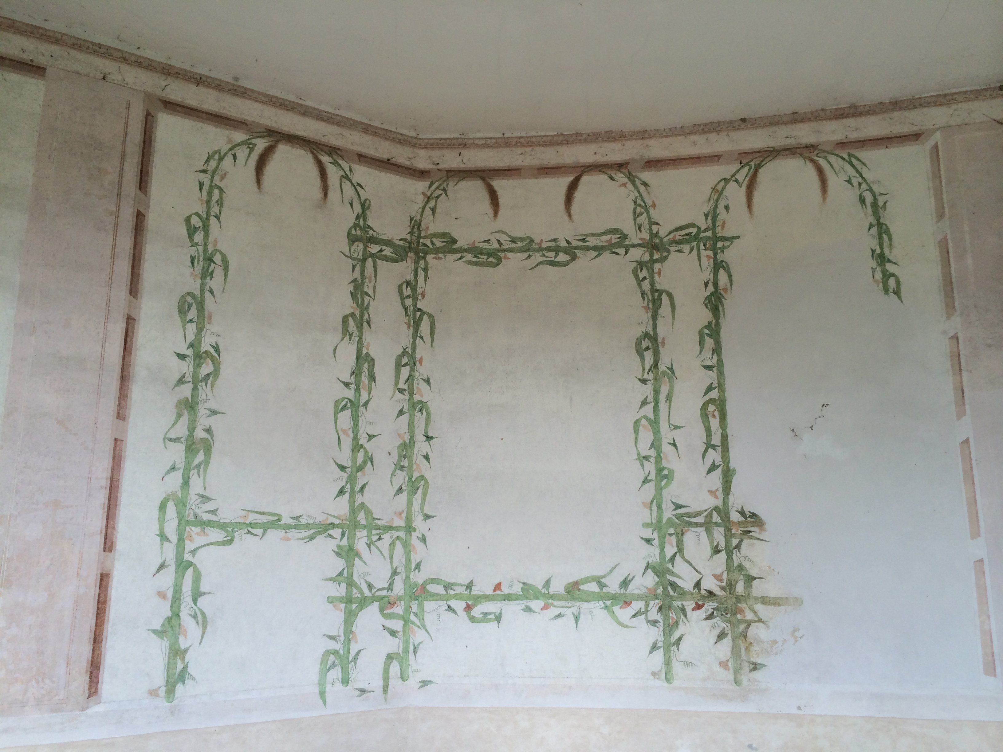 affreschi delle scuderie di villa Pisani - Stra